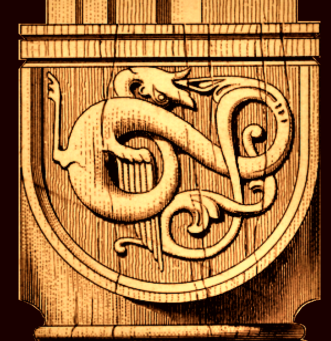 Stavkirke d'Urnes, Norvège, Chapiteau de la nef (image du domaine public (Ruprich Robert) modifiée